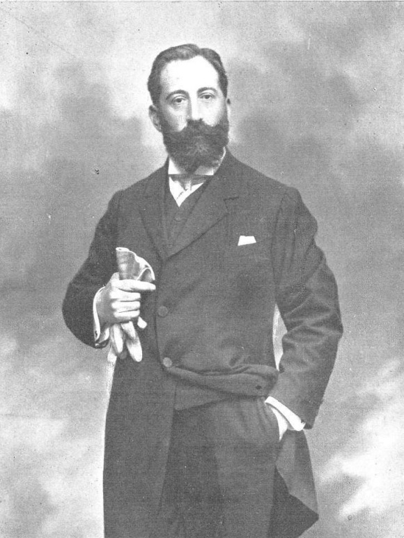 Luis María de Costantinopla, duque de Osuna y de Uceda, de Kaulak.